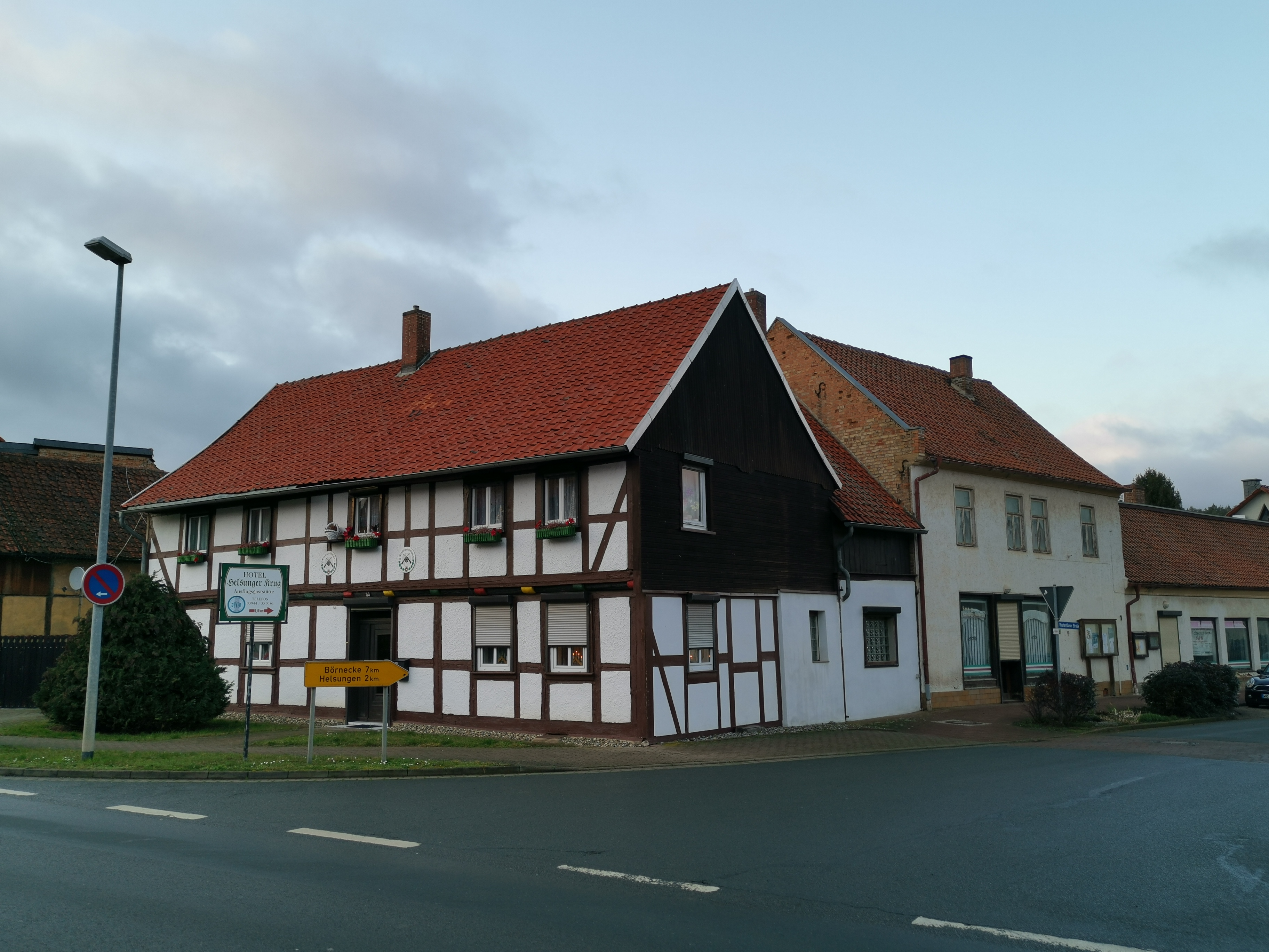 Blankenburger Straße 50 in Timmenrode